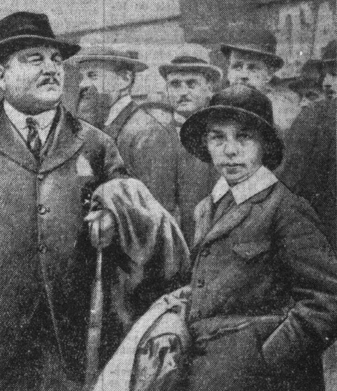 "Philippe Daudet à côté de son père, M. Léon Daudet. (Instantané pris au cours d'une récente manifestation d'Action française)".